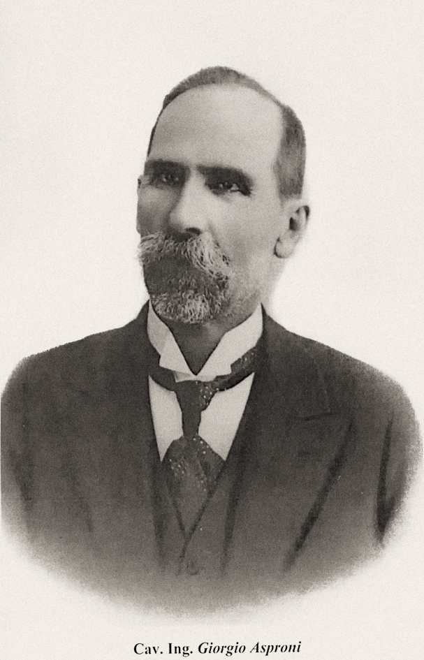 Foto a mezzo busto di Giorgio Asproni, primo presidente e fondatore nel 1896 dell'Associazione mineraria sarda (Associazione Mineraria Sarda)